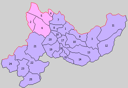 滋賀県甲賀郡の町村制時点の町村。